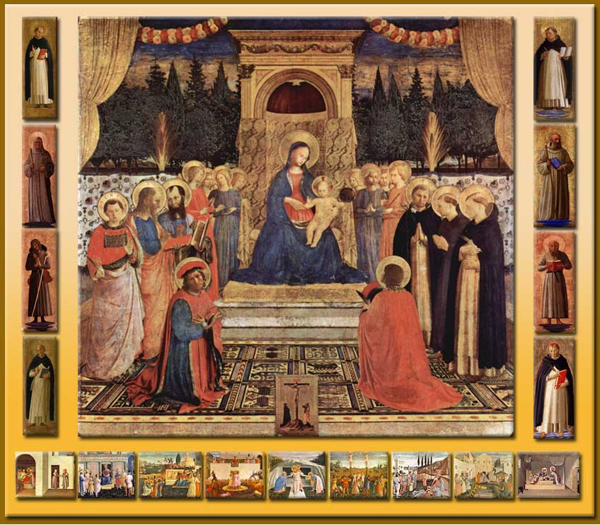 reconstitution hypothétique du retable de San Marco de Fra Angelico